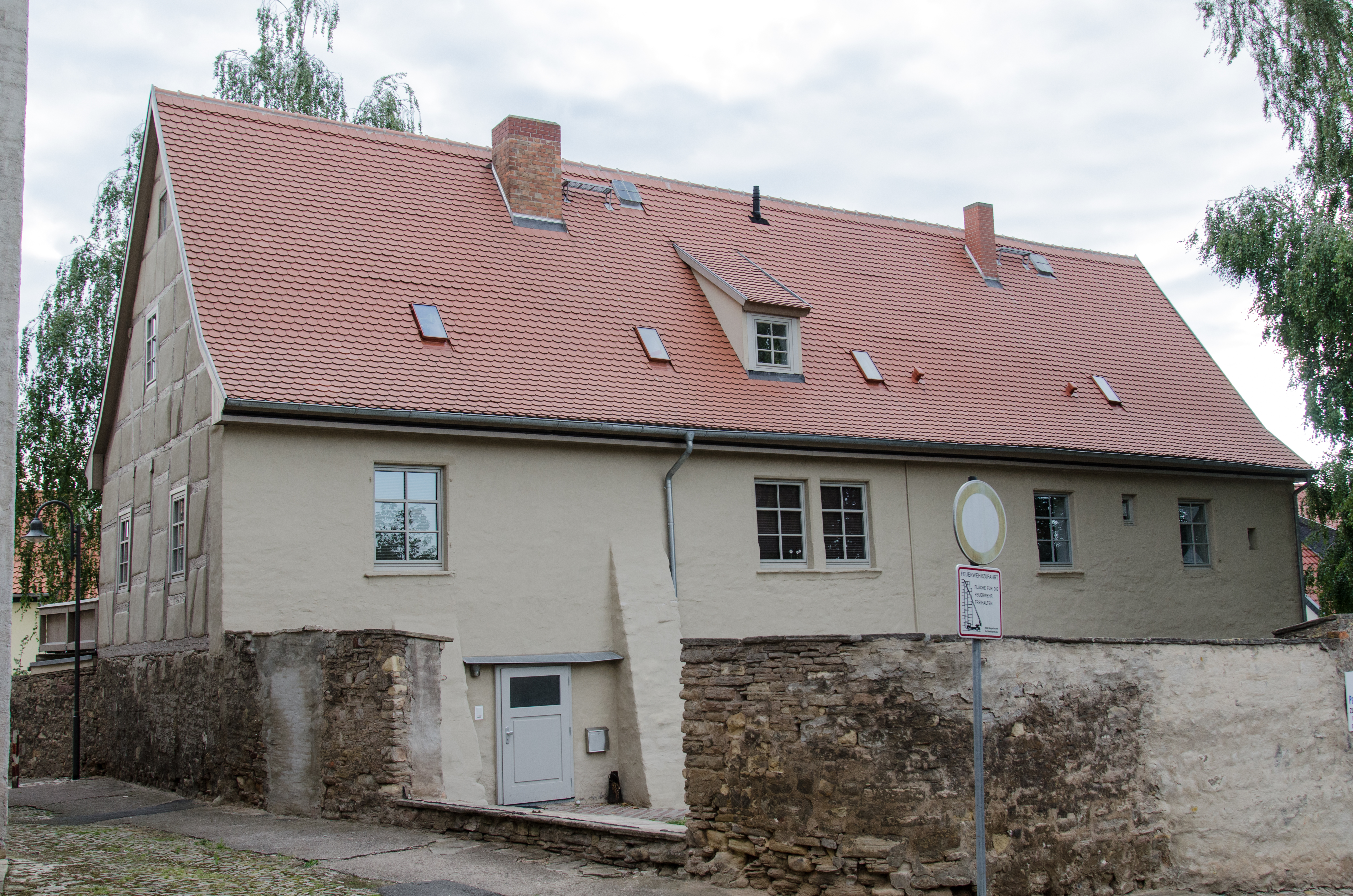 Sangerhausen, Hinter der Ulrichkirche 12